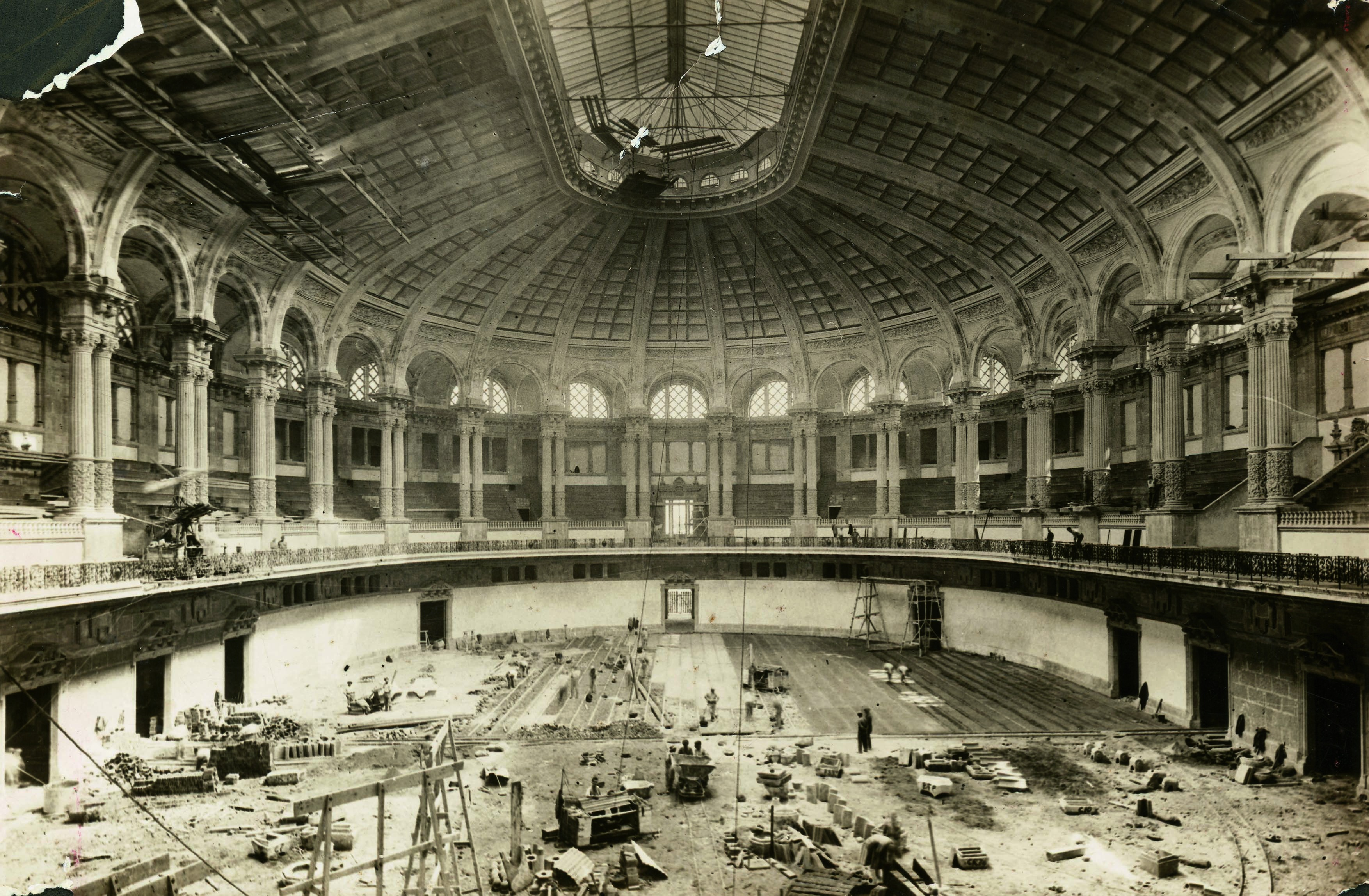 Construcció del Palau Nacional. Sala Oval. Autor desconegut, 1926-29